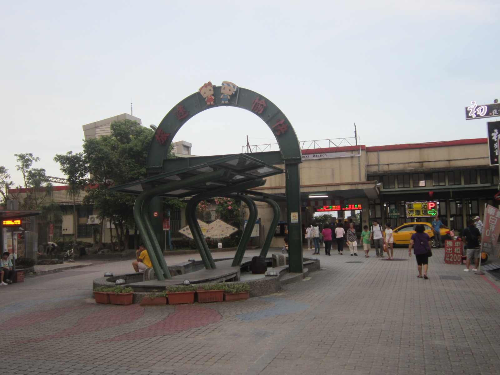 台鐵礁溪車站站房及站前廣場